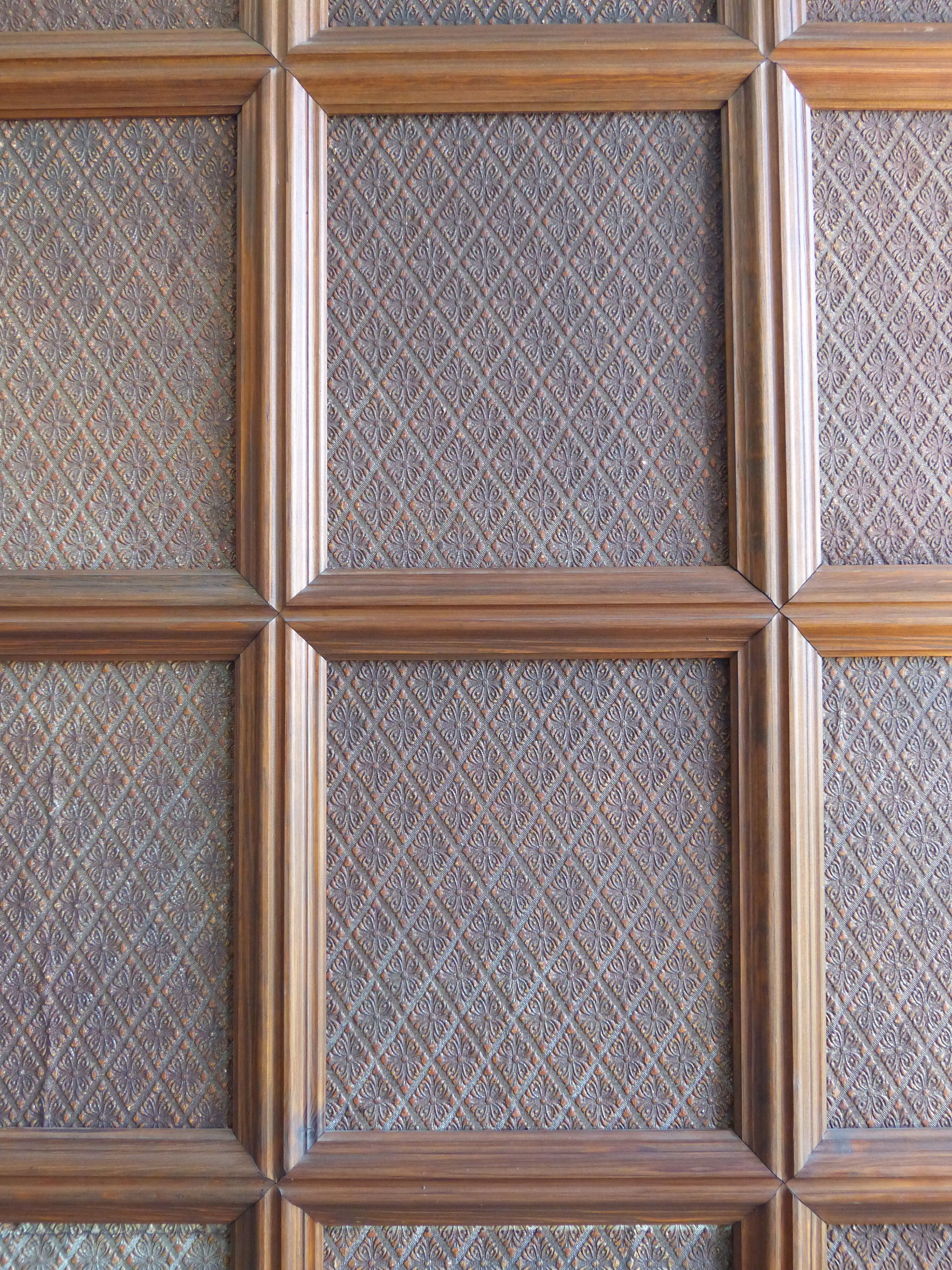 Orginal Lincrusta-Tapete aus der Schwebebahn in Loschwitz